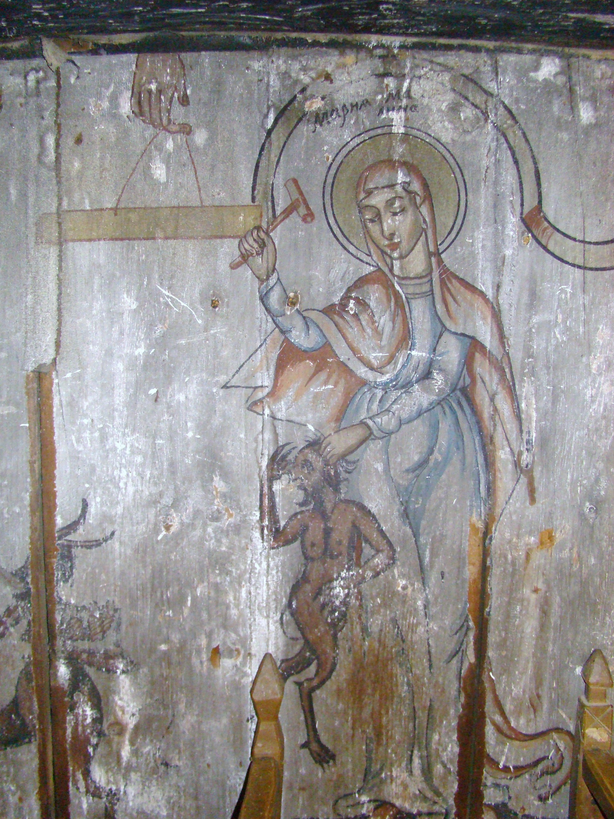 Biserica de lemn "Sfântul Dumitru" , sat DUBEŞTI; comuna OHABA LUNGĂ